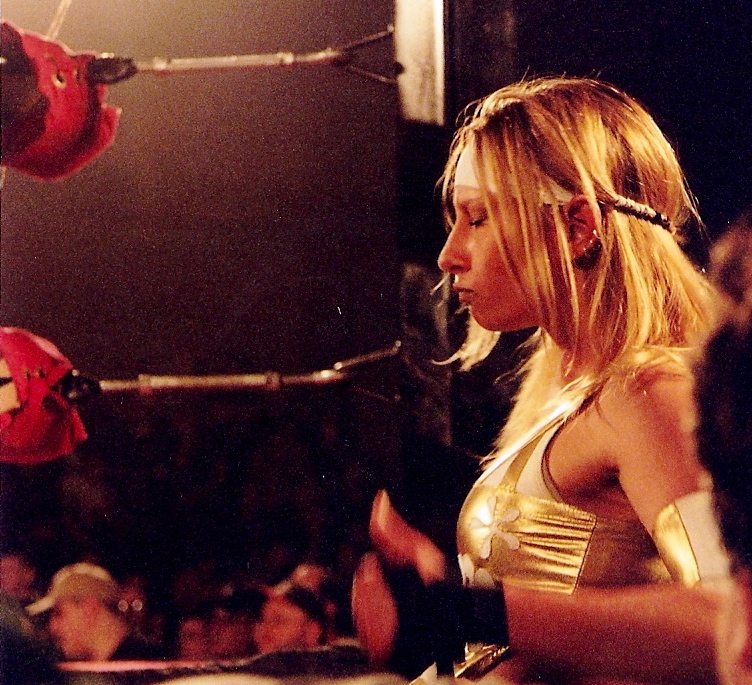 roh girl Daziee